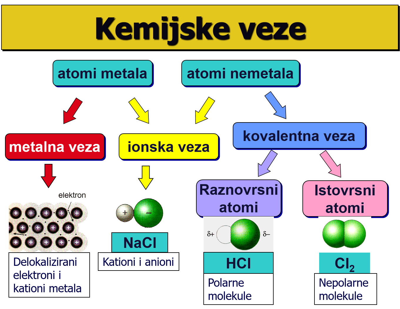 Kemijske veze shematski